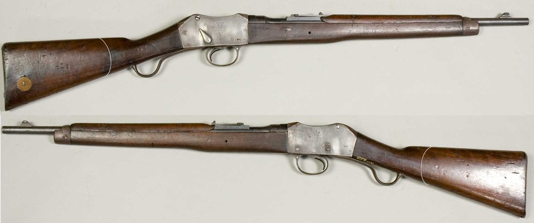 Karabinka Martini-Enfield, predelava puške Martini-Henry na sodobnejši 7,7mm britanski kaliber.